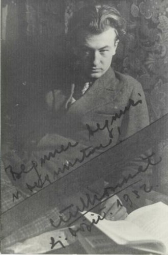 Ciril Kosmač (1910-1980), Slovene writer.